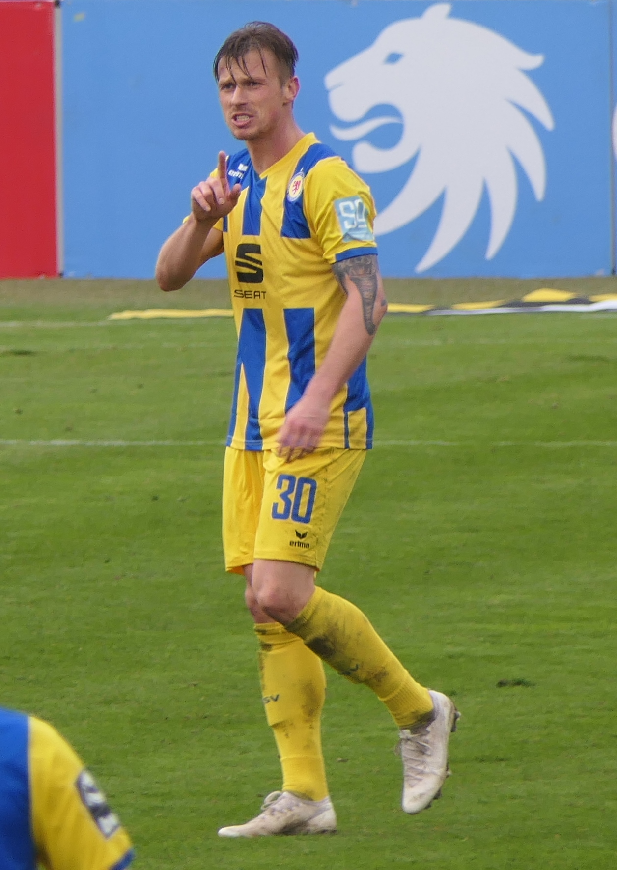 Der Fussballprofi Marvin Pourie im Trikot von Eintracht Braunschweig beim Auswärtsspiel gegen den TSV 1860 München am 26.01.2020.